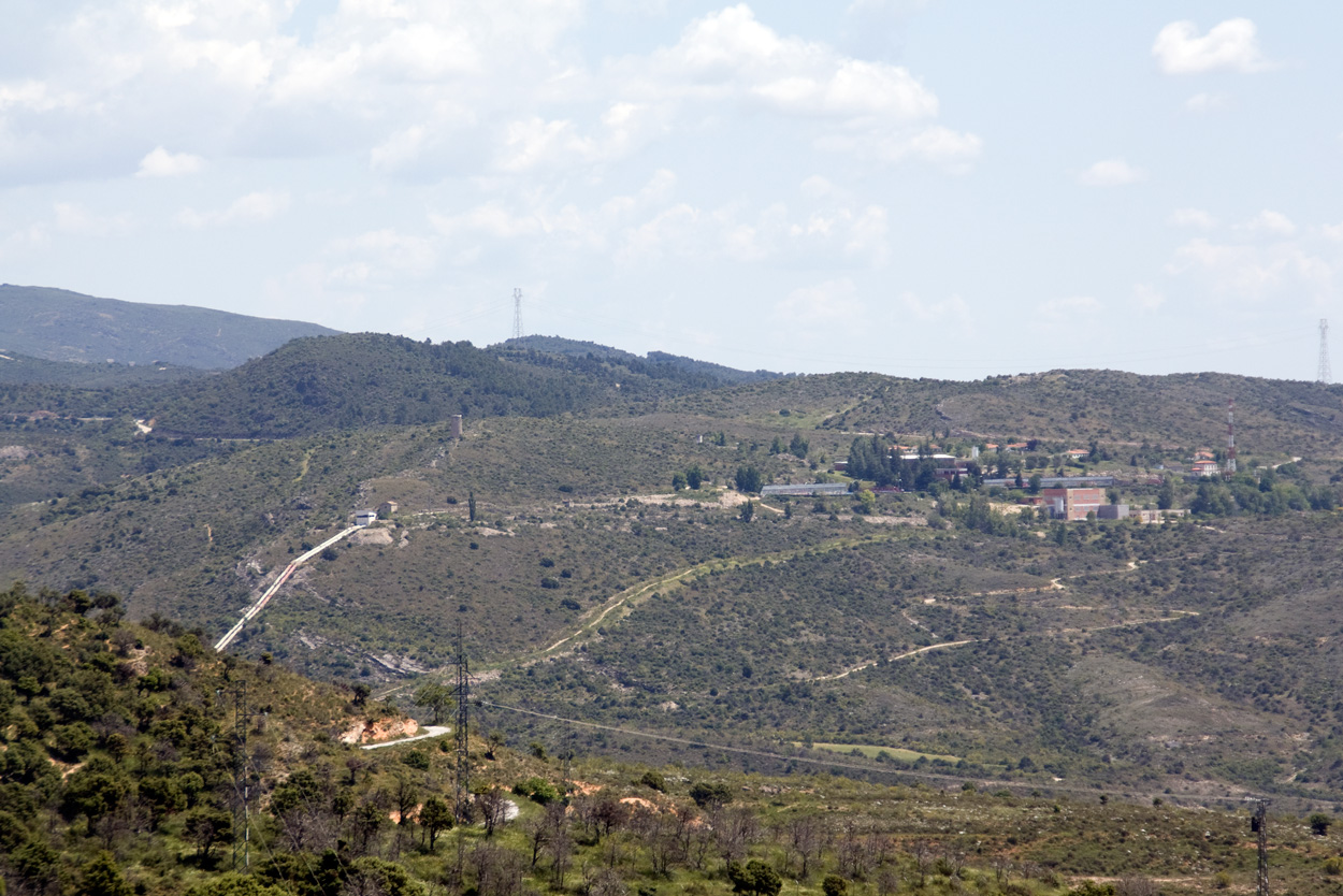 Depósito superior de Calerizas, ETAP de Torrelaguna y rama descendente del Sifón de San Vicente